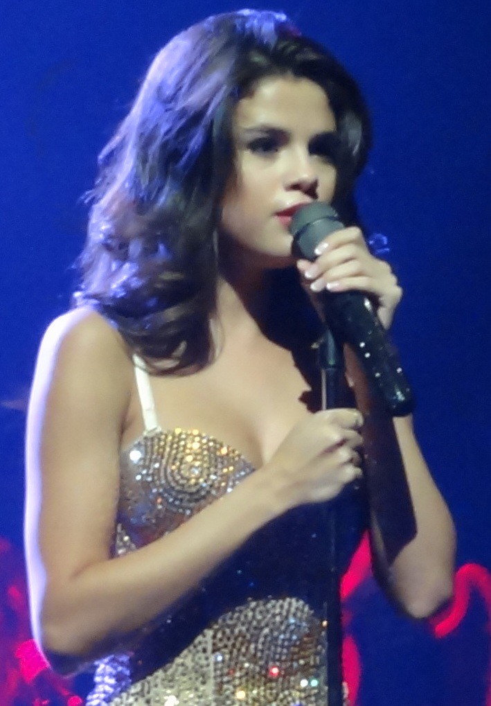 Selena Gomez & the Scene in concert